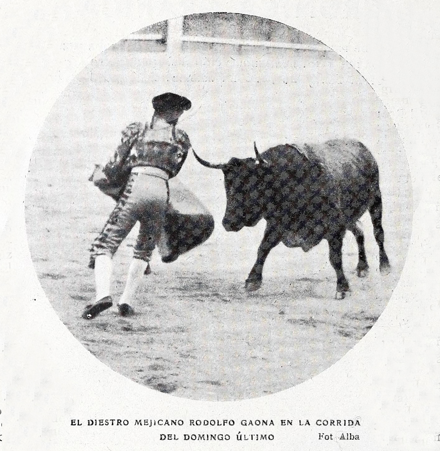 El diestro mejicano Rodolfo Gaona en la corrida del domingo último.